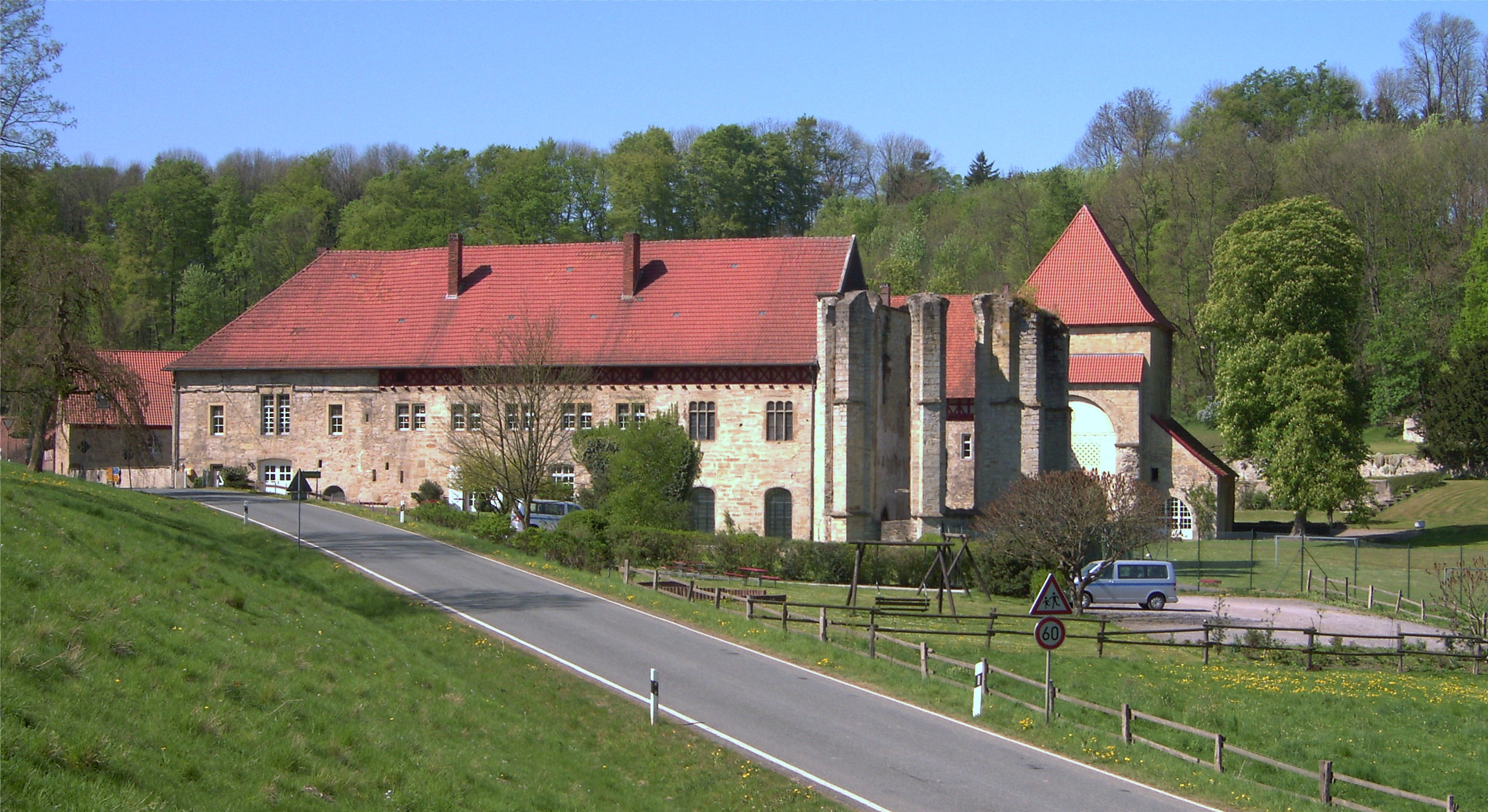 Ehemaliges Kloster und heutiges Gut Böddeken, bei Wewelsburg, Kreis Paderborn.